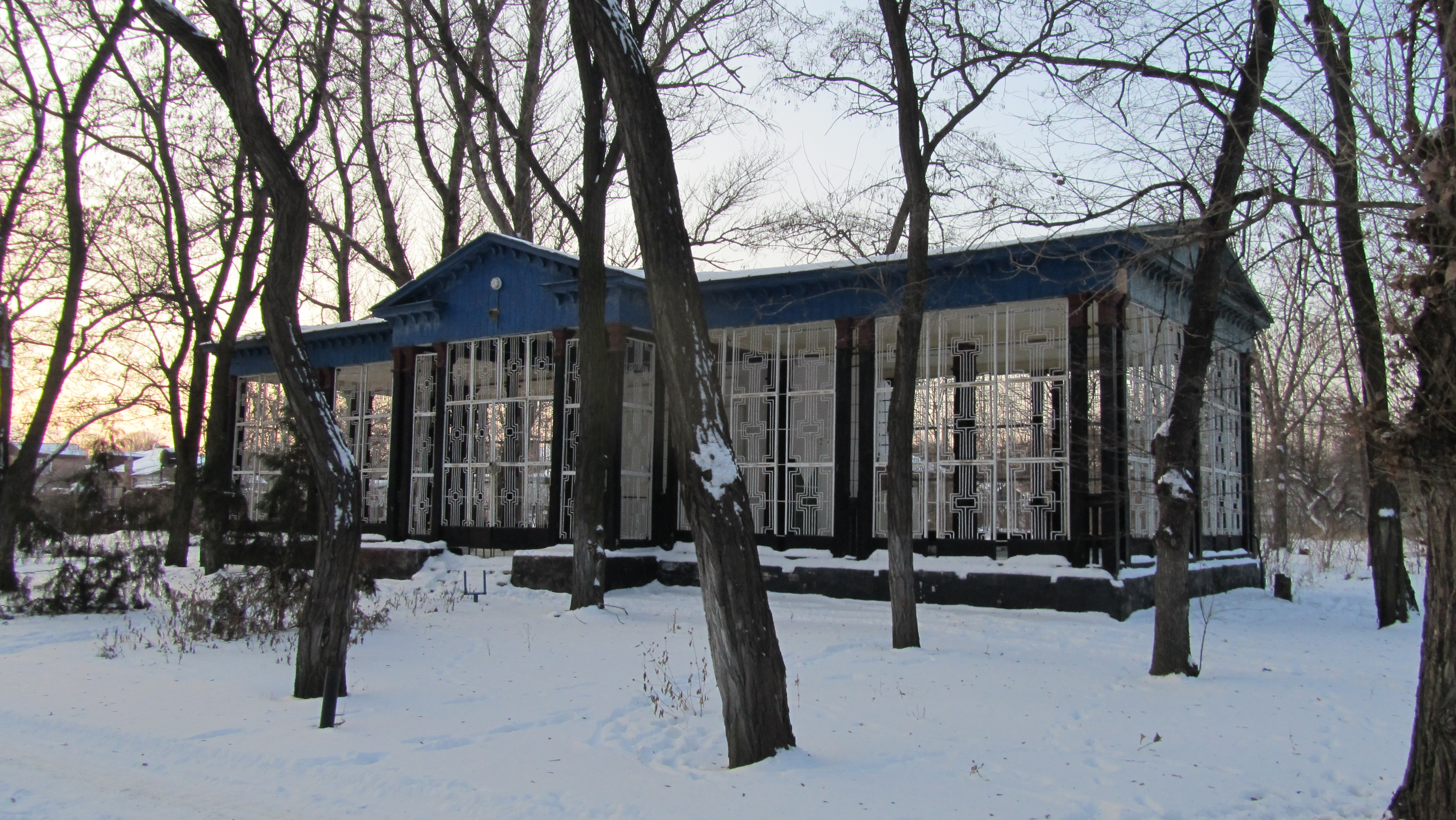 Парк Крюківського вагонобудівного заводу